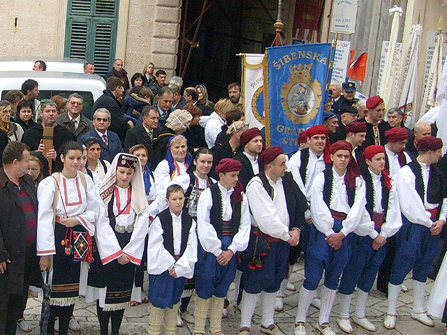 KUD "Brda" u Dubrovniku.